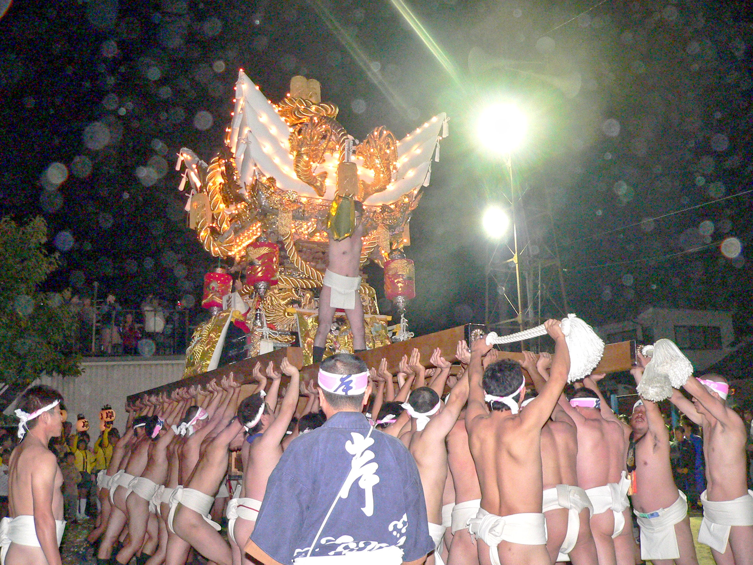 生石神社の岸の屋台